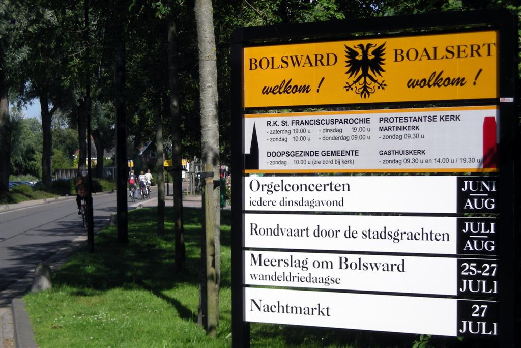 Bord evenementen in Bolsward (2007)